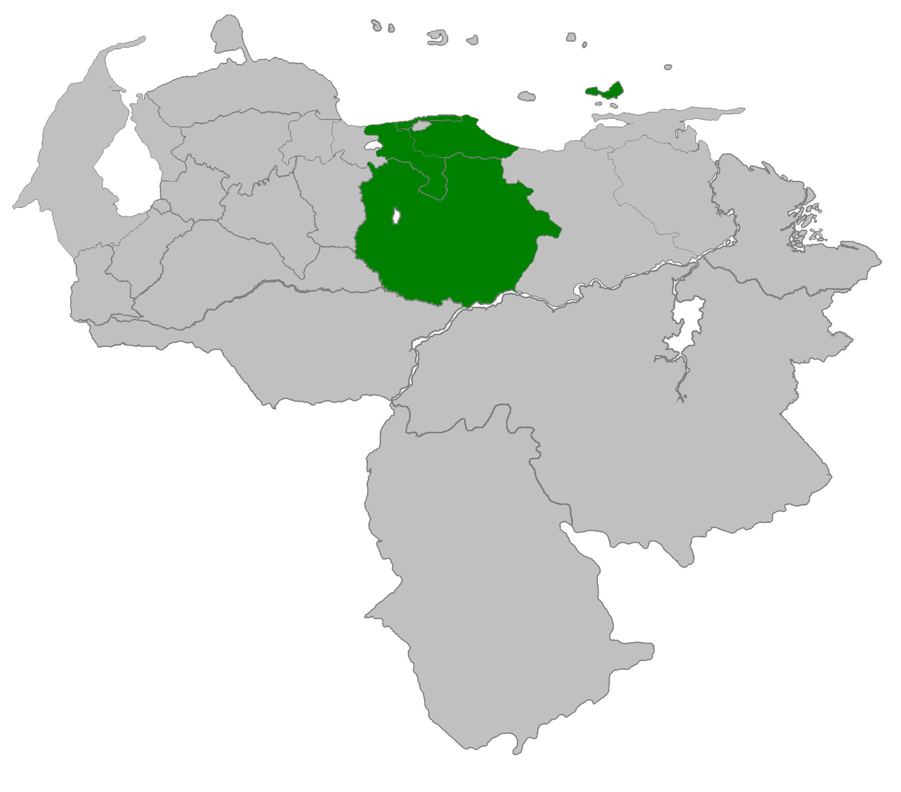 Ubicación del antiguo estado Guzmán Blanco en Venezuela